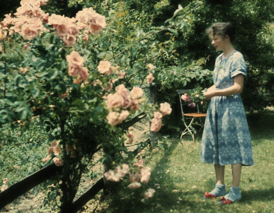 Foto von Theodor Strübin, Elisabeth Handschin (1920–1968), Pädagogin, Lehrerin im Kinderheim Farnsburg in Ormalingen, Lyrikerin.